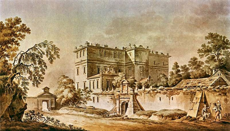 Zygmunt Vogel "Widok zamku w Krasnymstawie" Rok 1794. Akwarela. 35,9 x 55,9 cm.